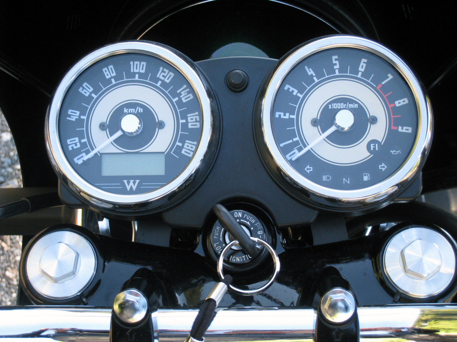 Anzeigeinstrumente bei der Kawasaki W800